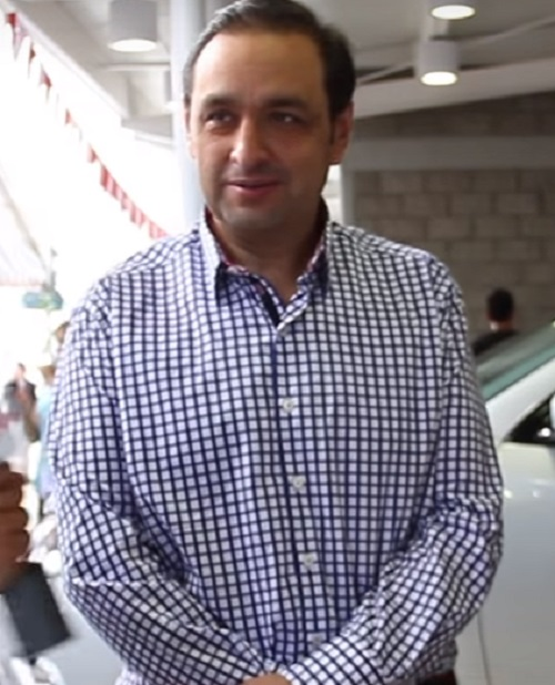 Presentador colombiano Jorge Alfredo Vargas